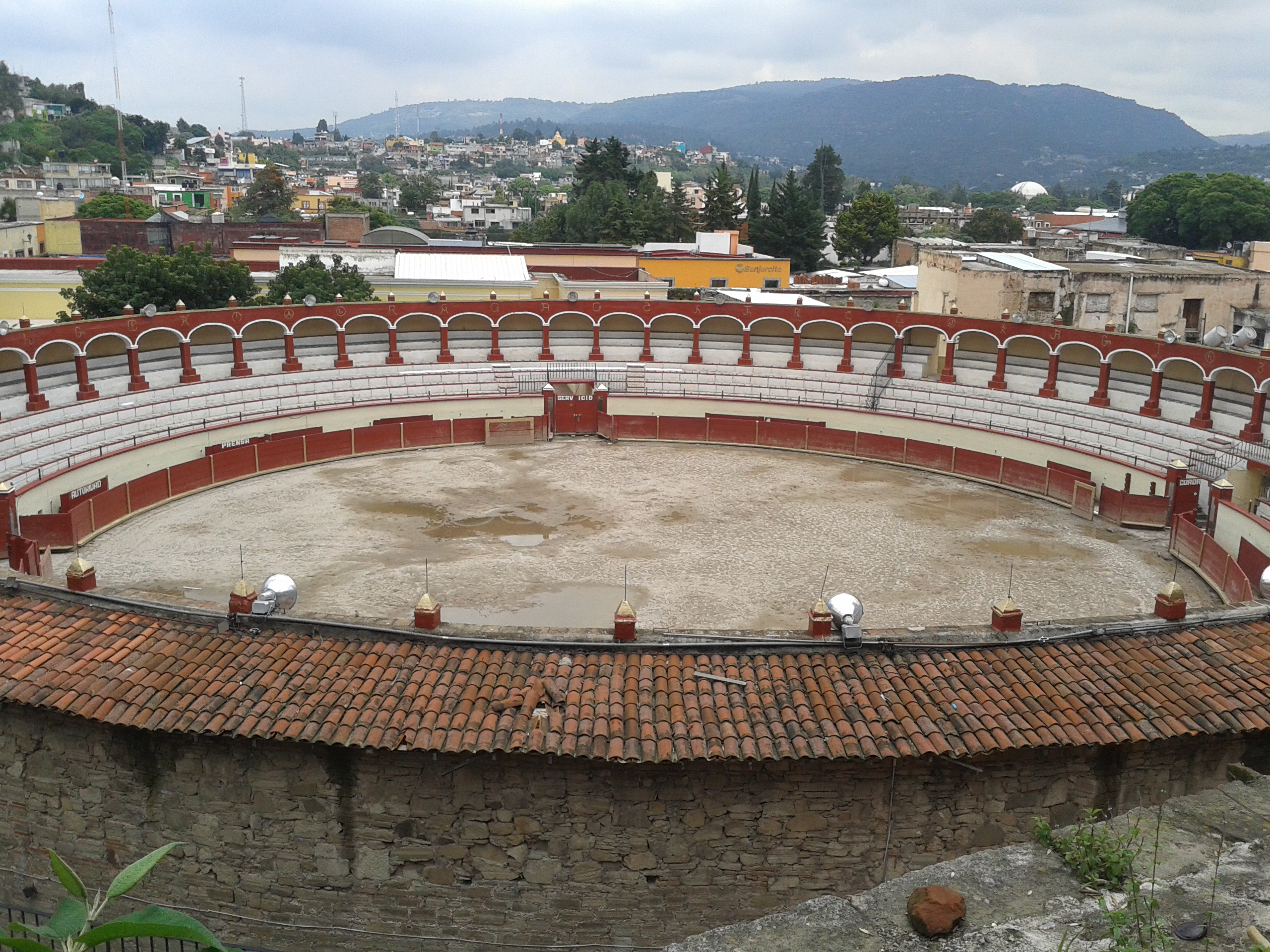 Primera plaza de toros de latinoamerica en Tlaxcala, México.